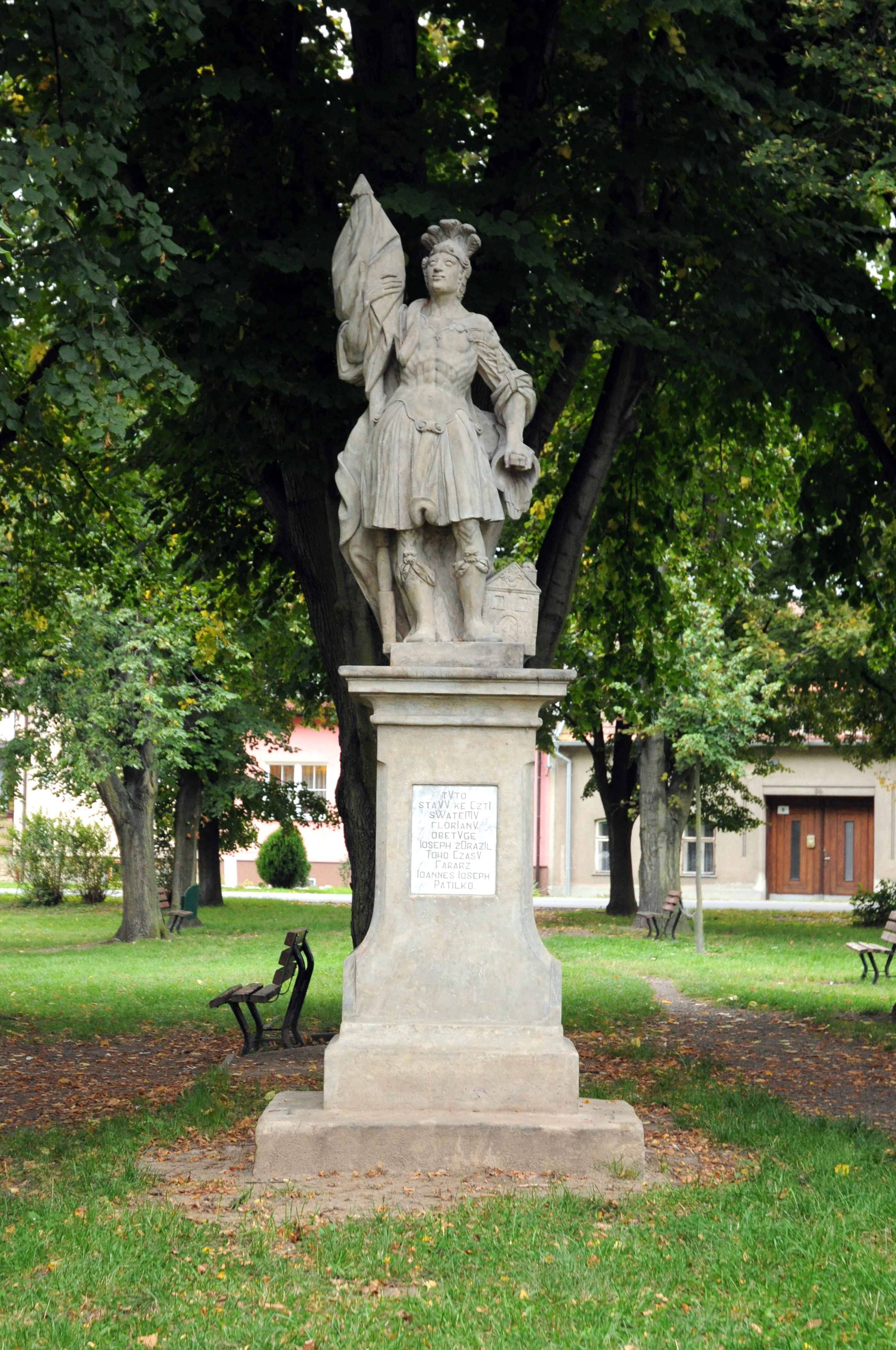 Socha sv. Floriána (Prostějov - Vrahovice), v parku, Vrahovice-Trpinky